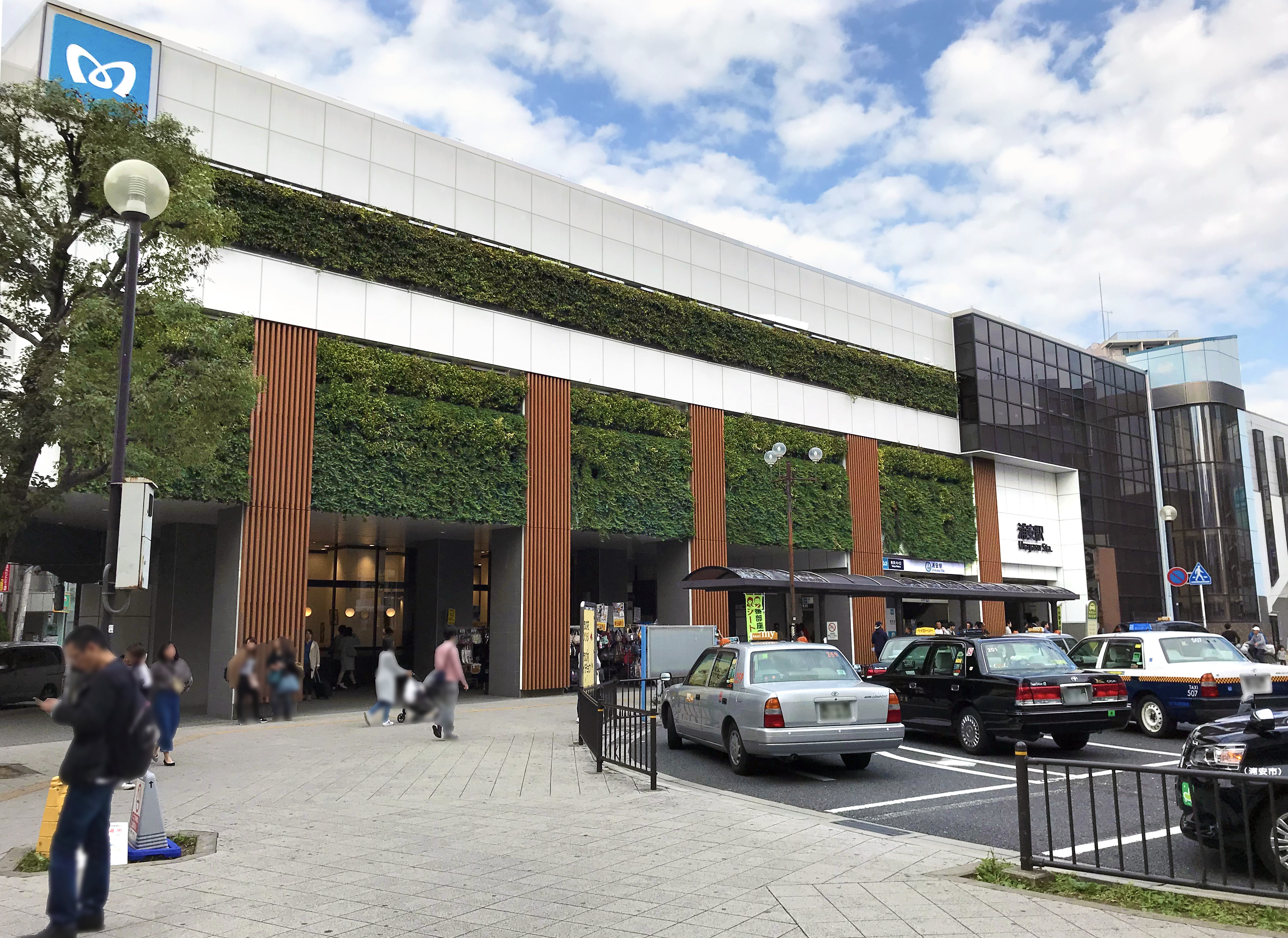 東京メトロ東西線浦安駅駅舎（南口）